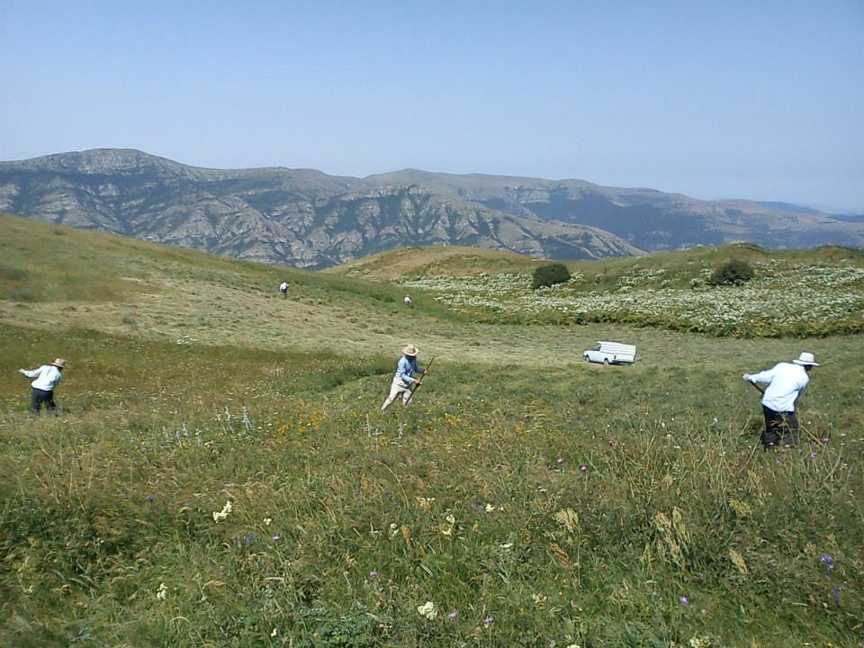 دروي گياه دارويي بالديرغان در آرپاچوخوري روستاي خان كندي گرمي